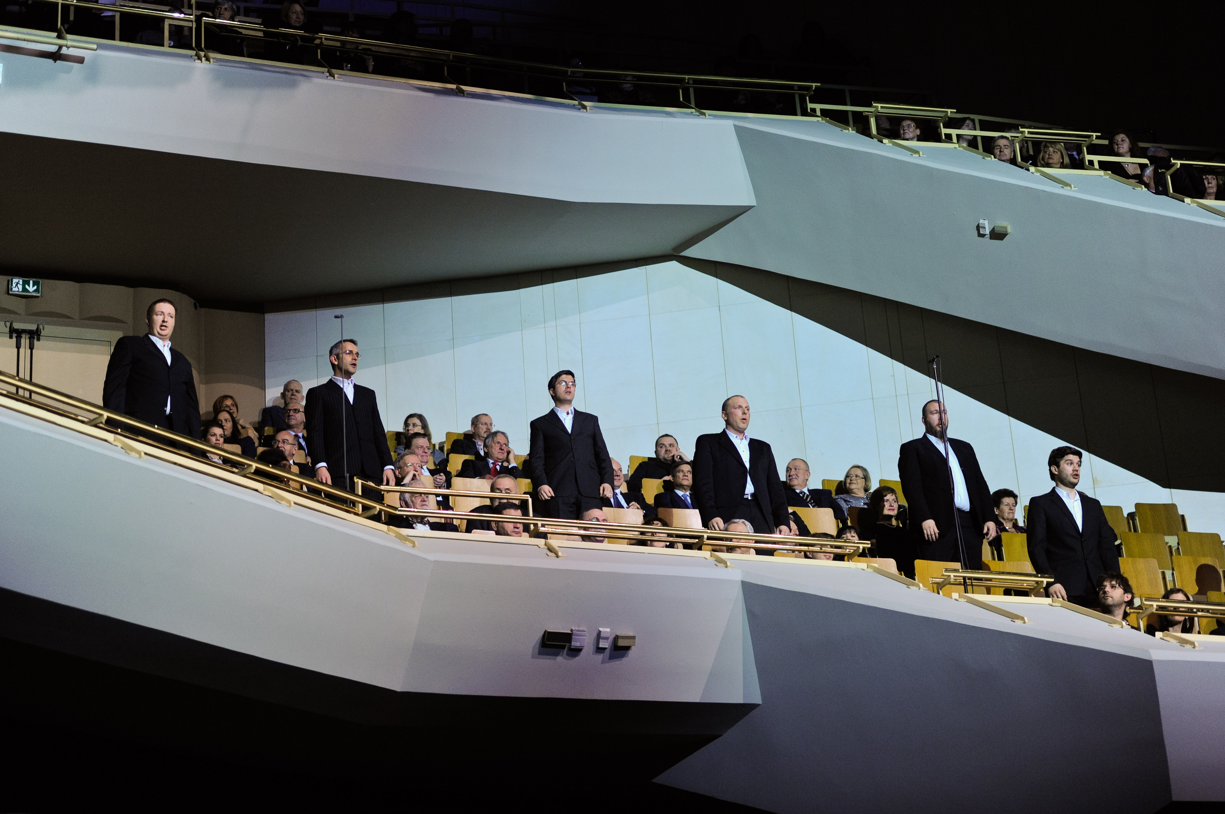 Državna proslava ob Prešernovem dnevu